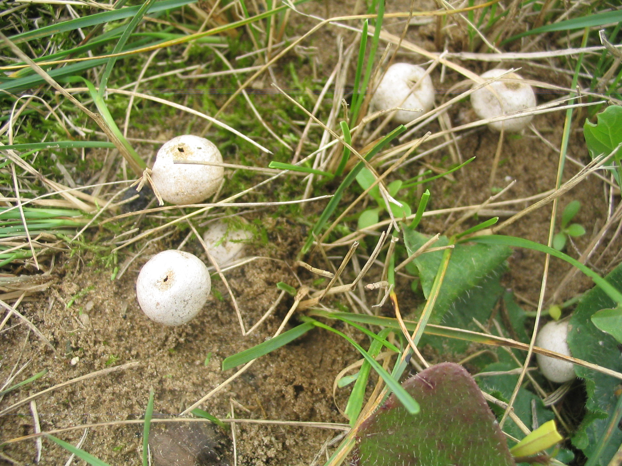 Gewimperter Stielbovist (Tulostoma fimbriatum) aufgenommen am 29.09.2007 von Dr. Hagen Graebner